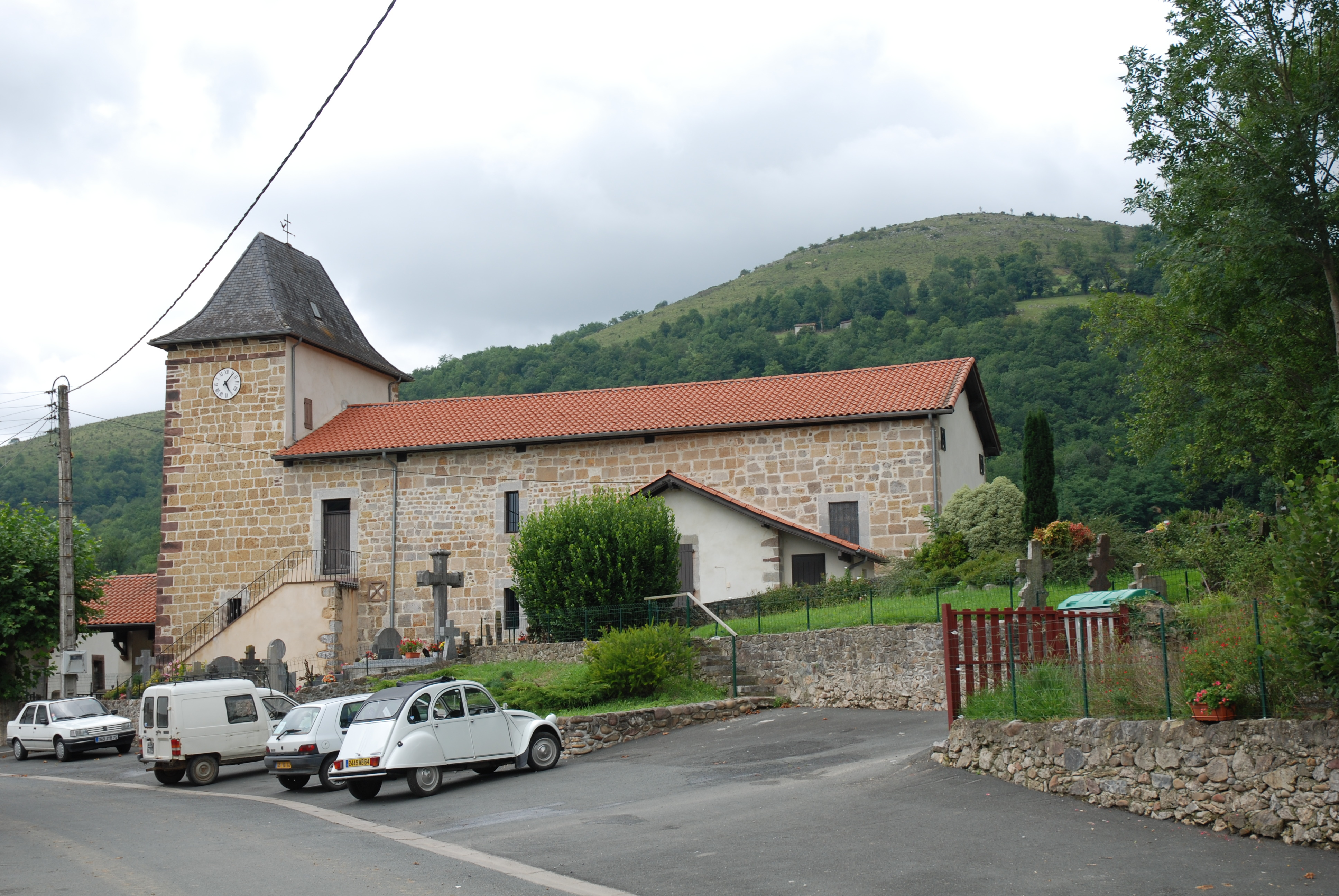 Mendive, église Saint-Vincent